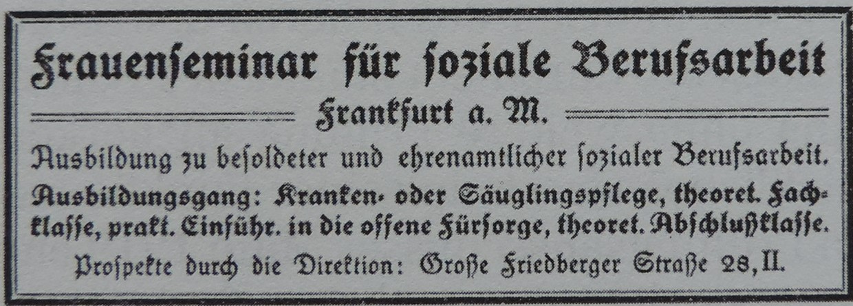 Anzeige aus dem Jahre 1920